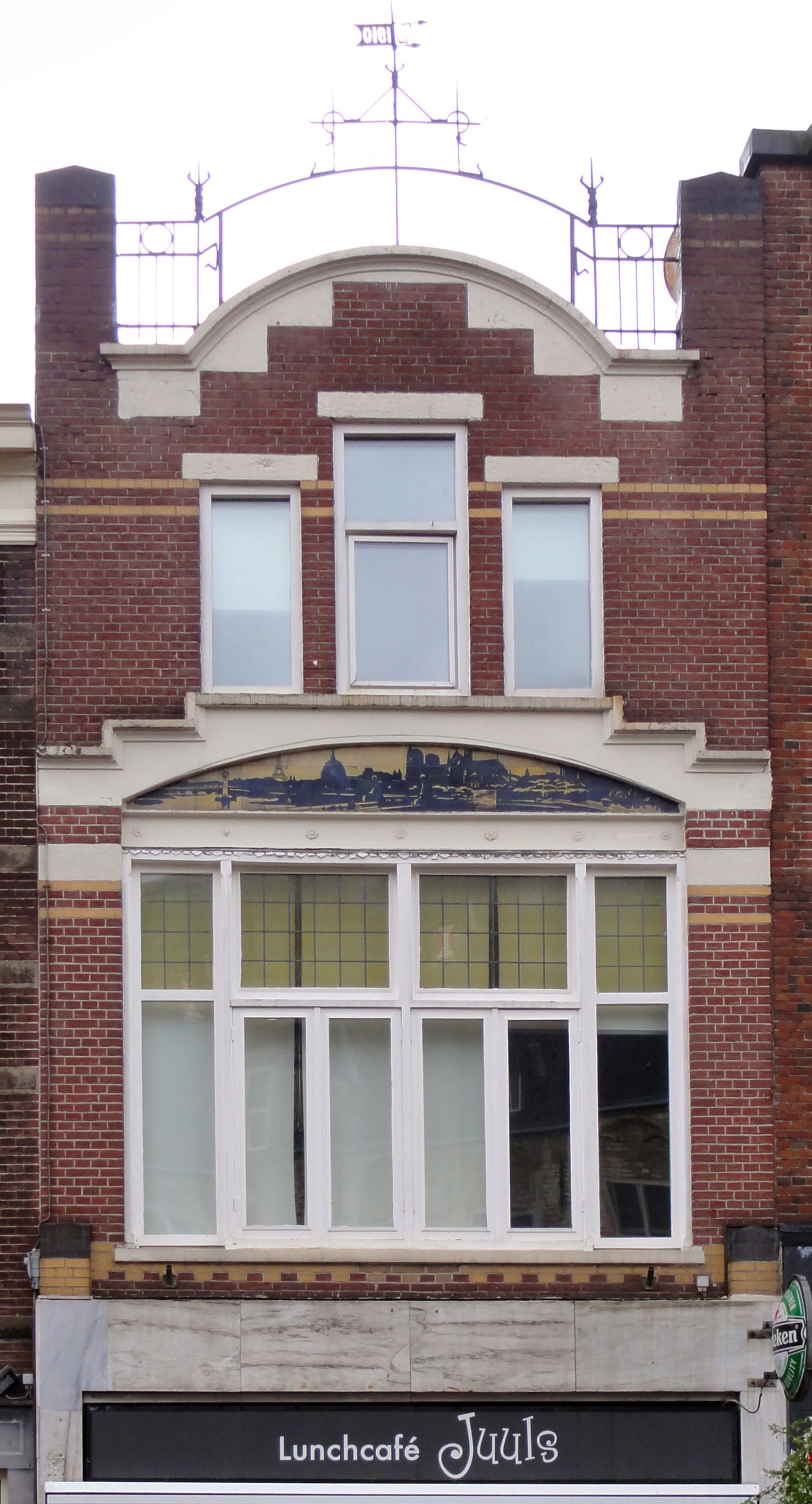 Markt 10 Gouda, voormalig kledingmagazijn "De stad Parijs", voorgevel vernieuwd 1910/1911 door de architect H.J. Nederhorst jr.